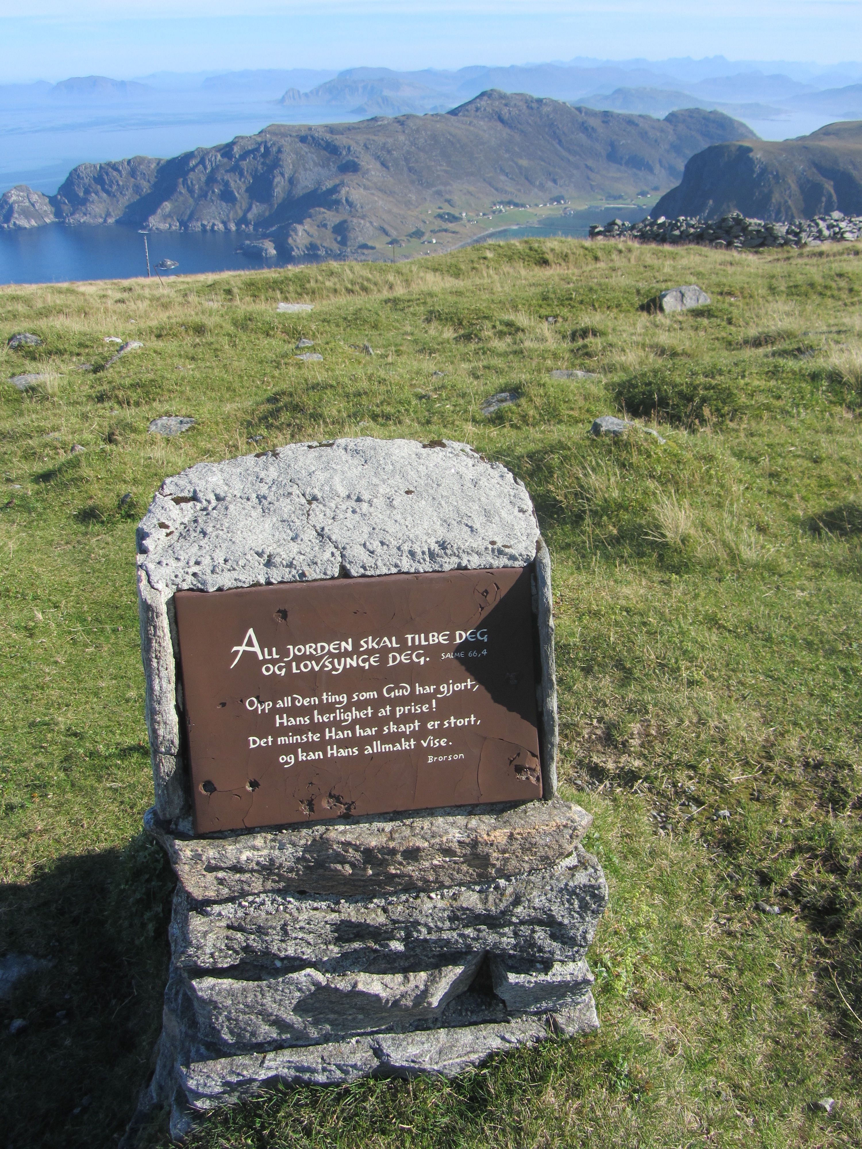 Støtte med bibel- og salmesitat på «Vestkapp», fjellplatået på Kjerringa nord på Stadlandet i Selje kommune i Sogn og Fjordane. Utsikt østover inn i Møre og Romsdal.